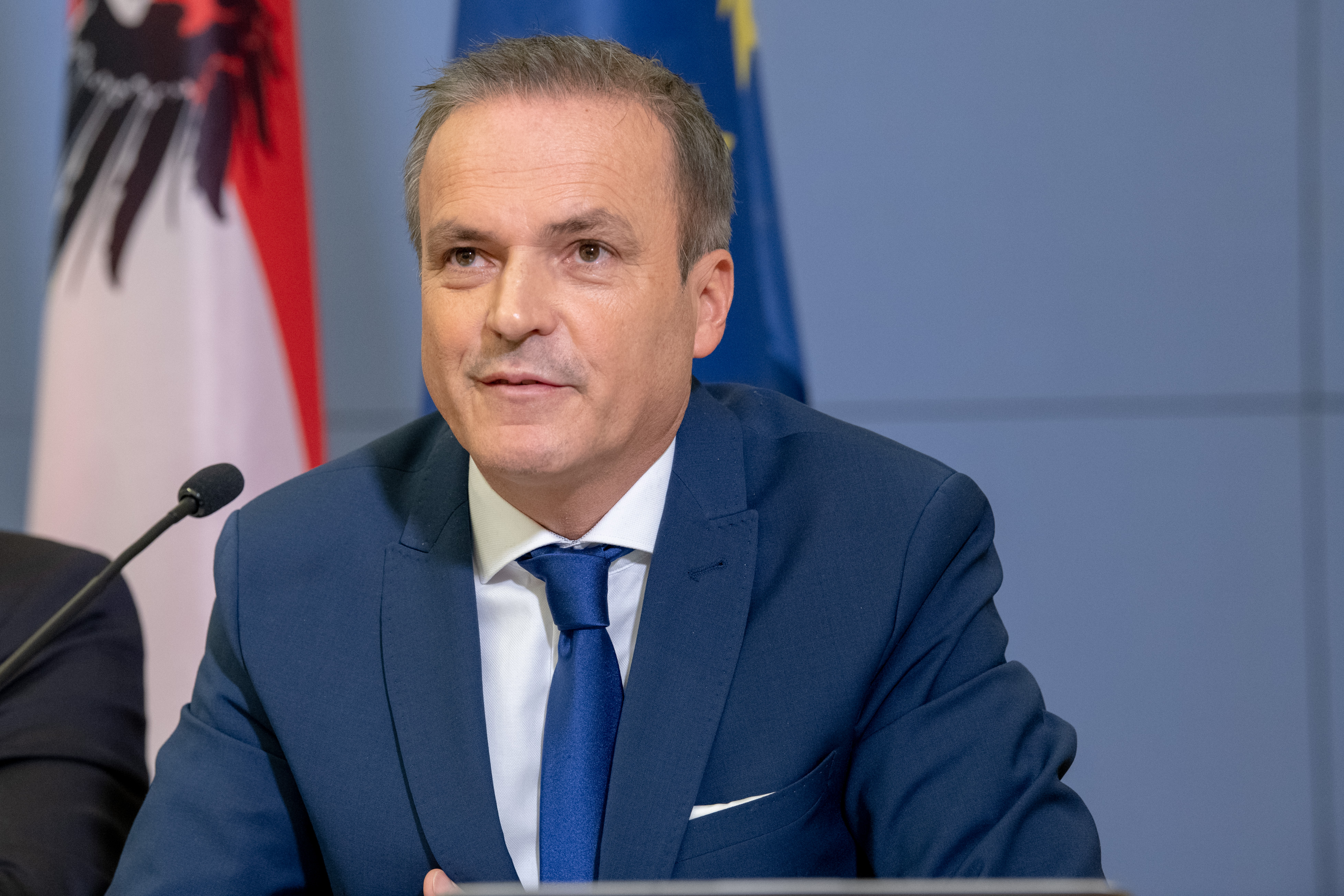 Löger präsentiert Anti-Steuerbetrugspaket